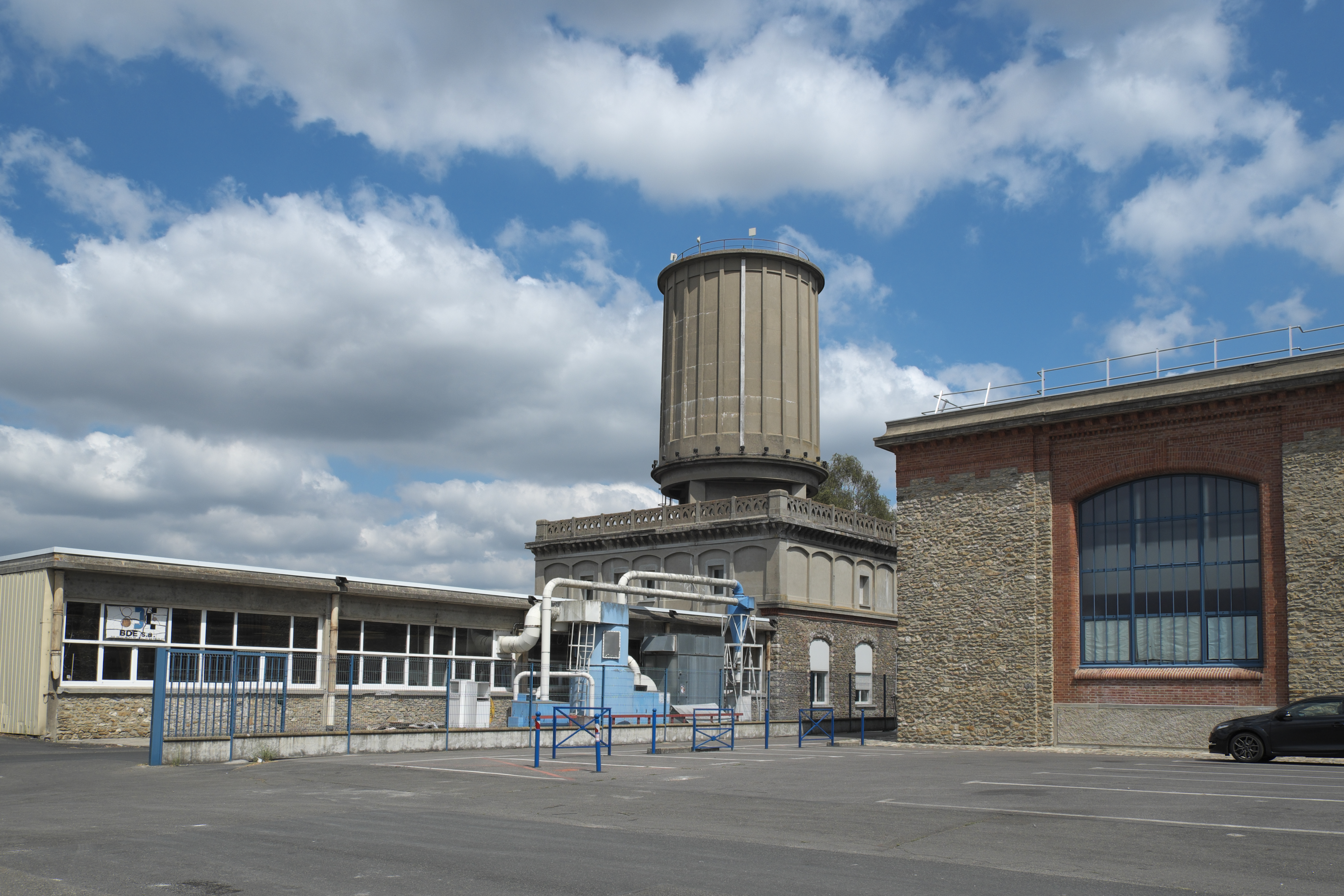 Ehemalige Papier- und Tapetenfabrik Leroy in Saint-Fargeau-Ponthierry im Département Seine-et-Marne (Region Île-de-France/Frankreich)